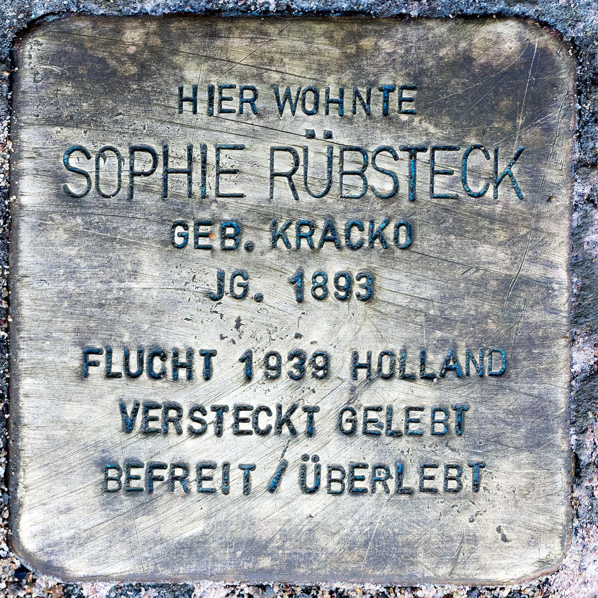 Stolperstein für Ruebsteck, Sophie